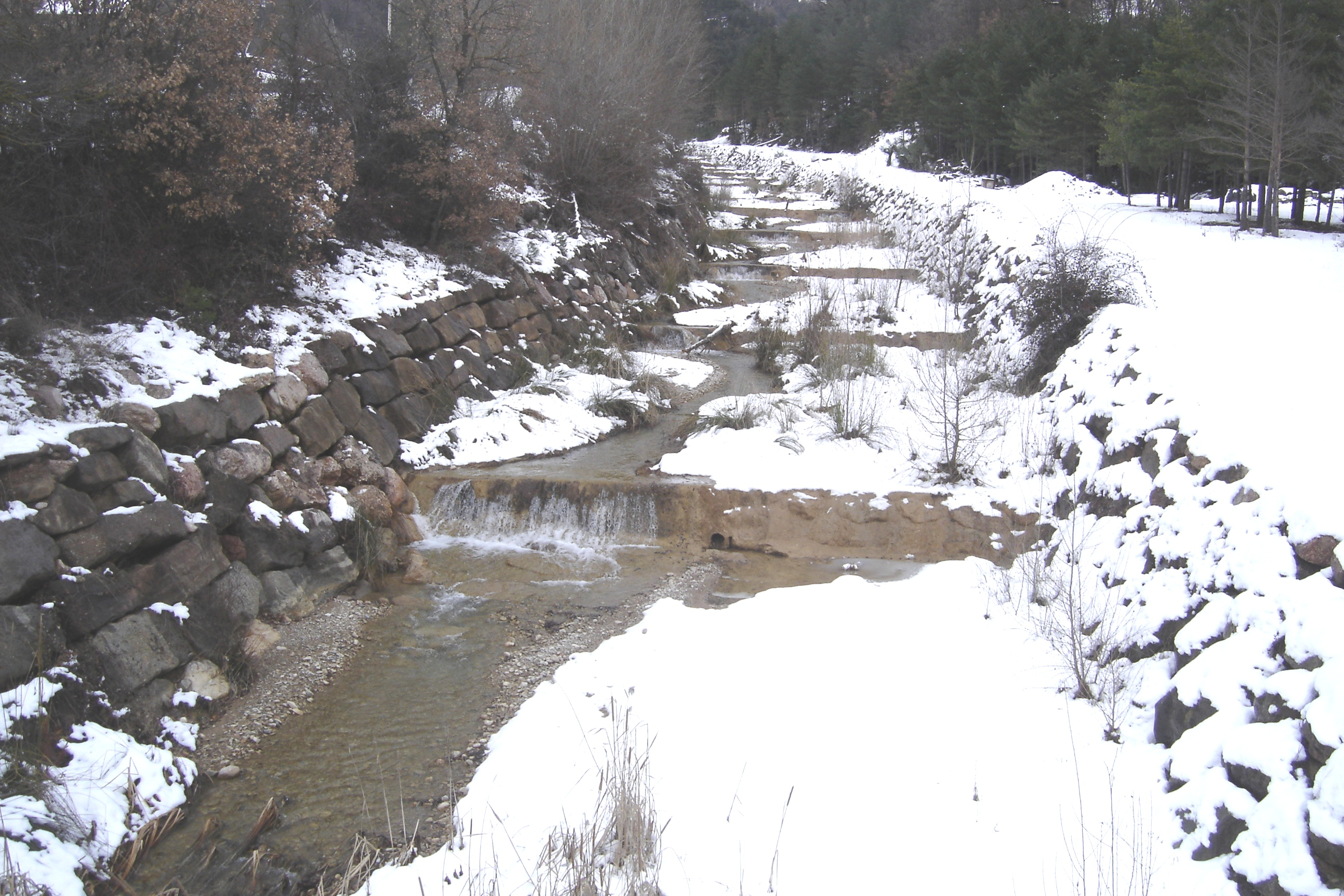 El riu Mosoll (la Pedra i la Coma, Solsonès) en el tram canalitzat a tocar de la seva confluència amb el Cardener.